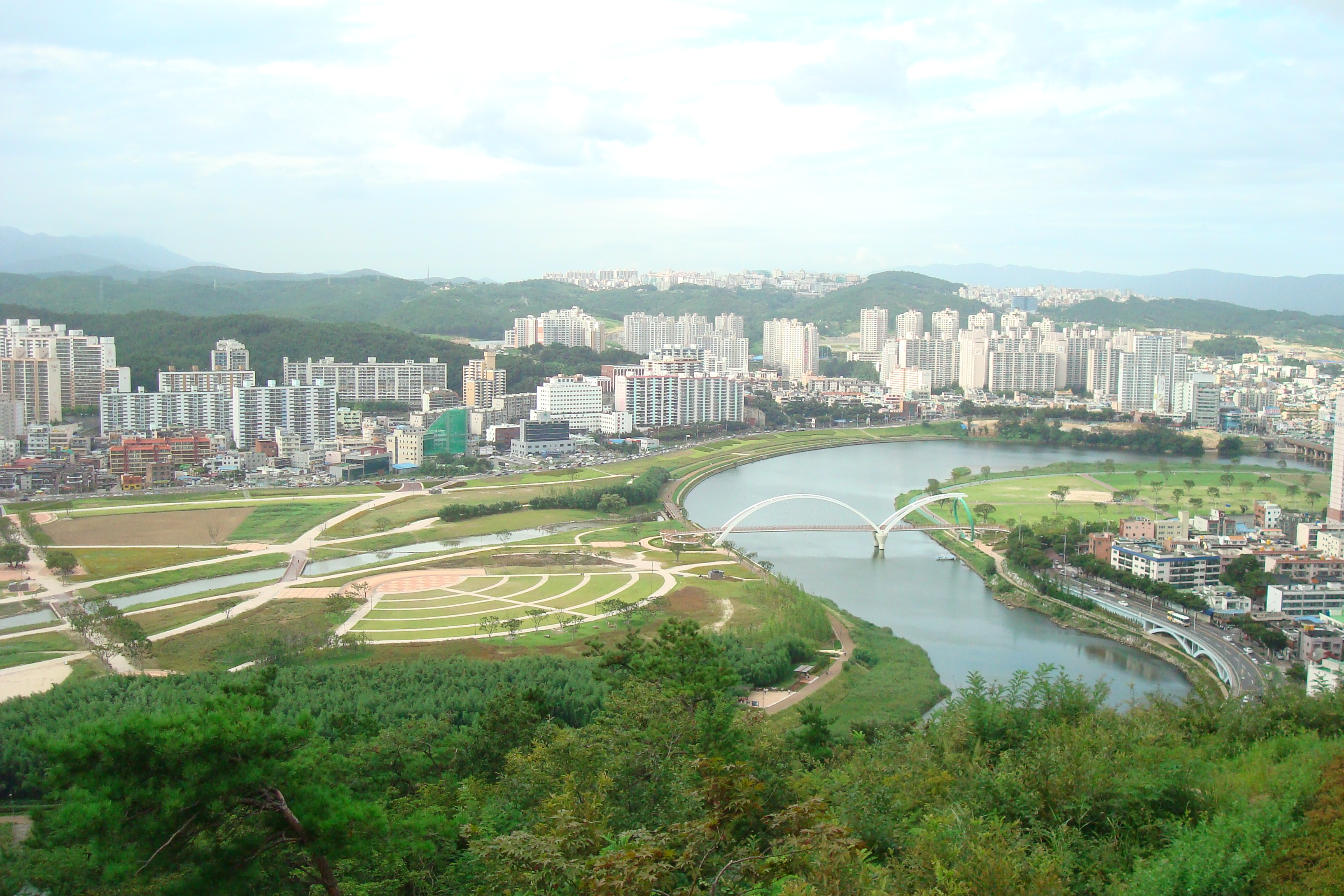 남산에서 바라 본 태화강